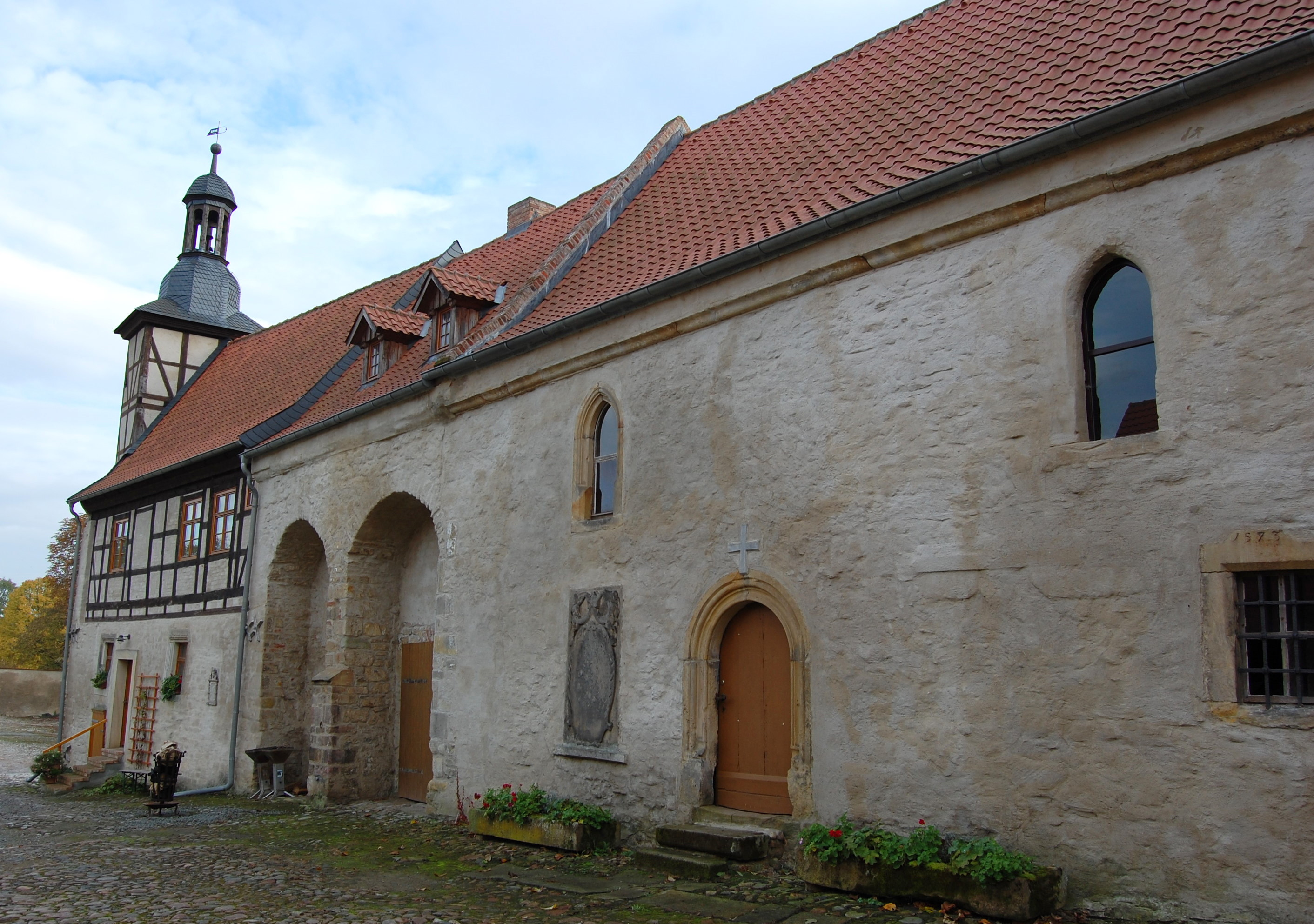 Kapelle der Komturei Bergen, rechte Tür ist der Zugang zur Kapelle